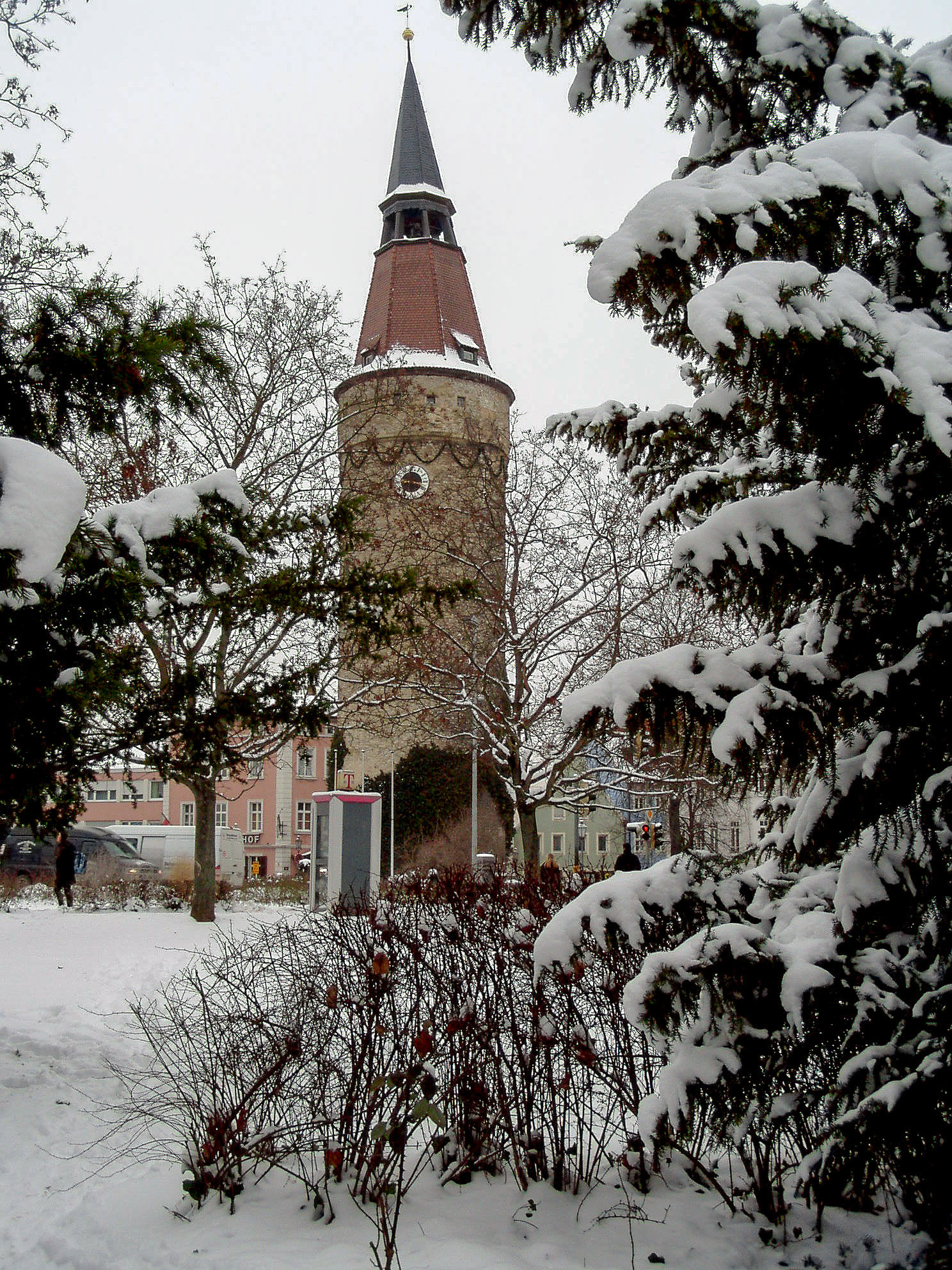 Der Falterturm, das Wahrzeichen der unterfränkischen Stadt Kitzingen